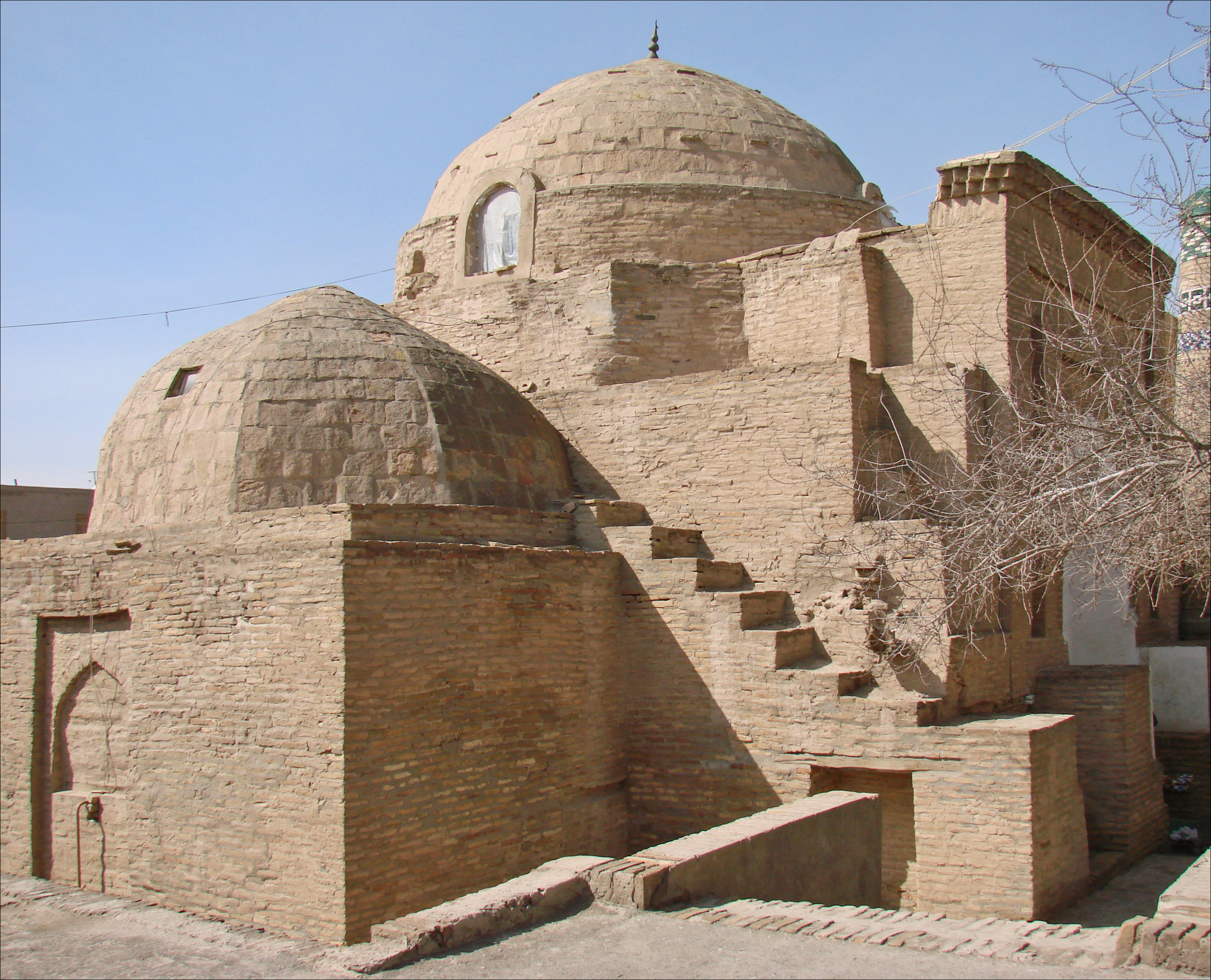 La tombe de Saïd Allaudin (Seyid Ala Ad-Din) date de l'ère mongole. Elle a été bâtie en briques cuites au 14ème siècle autour du tombeau du maître soufi Saïd Allah ad-Din (mort en 1303), c'est la plus ancienne construction de Khiva. Pour les mausolées de ce type, l'architecture sacrée islamique allie le cube et le dôme, deux formes fondamentales héritées de Byzance, qui symbolisent les liens entre la terre et le ciel et tracent la voie que le saint a suivi pour se rapprocher d'Allah.